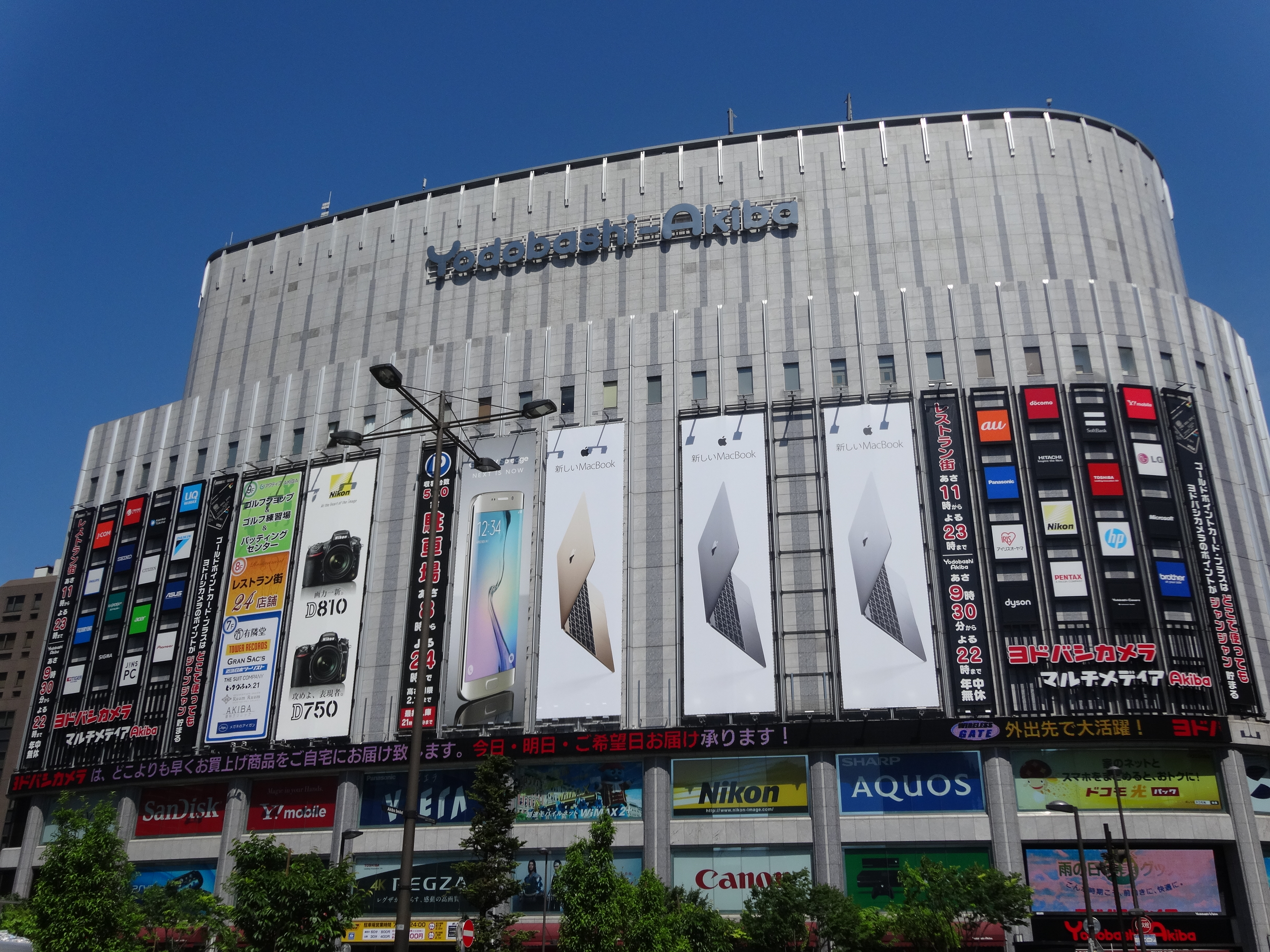 ヨドバシAkiba。2015年5月撮影。